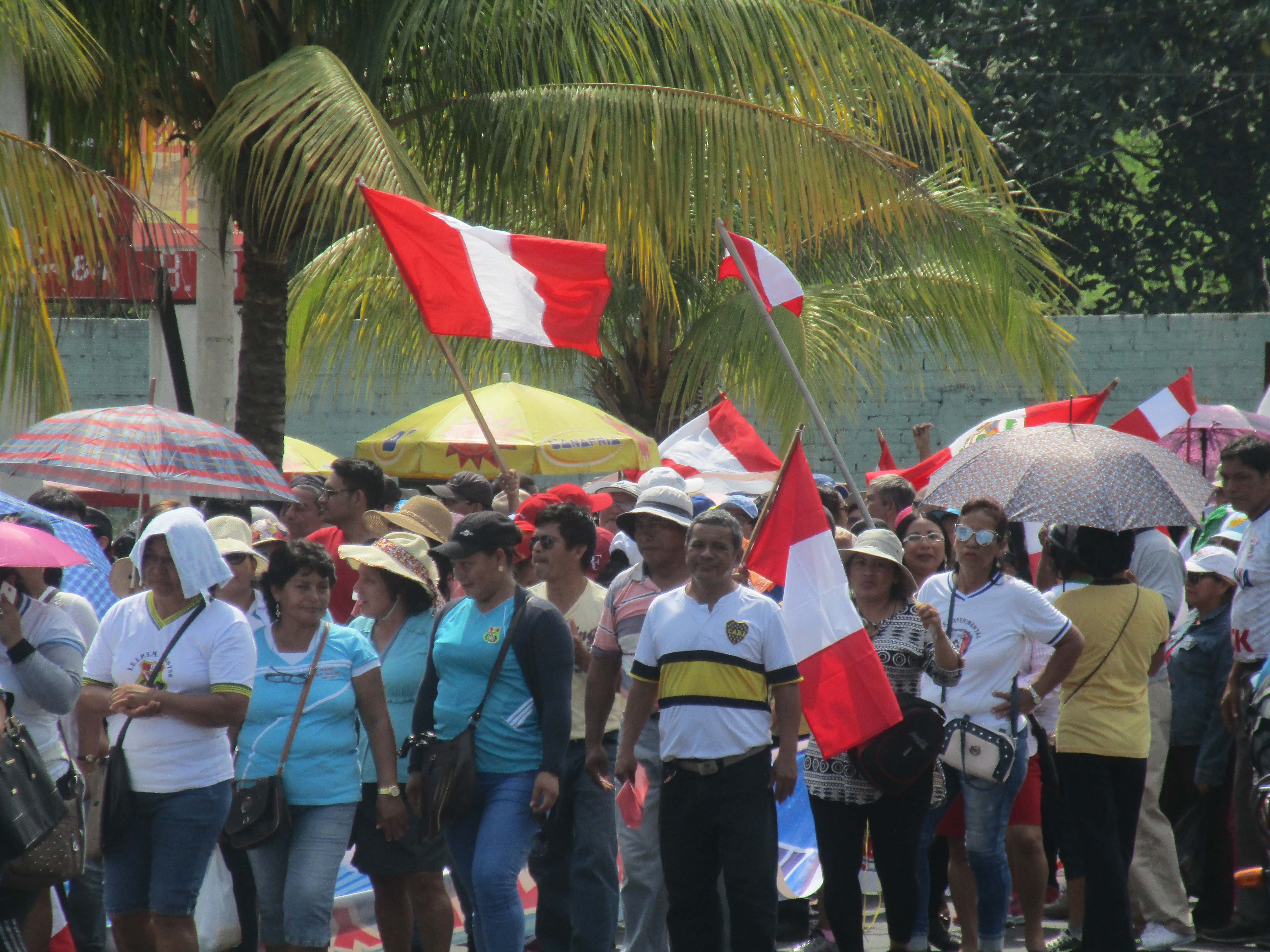 Profesores y médicos protestan en la huelga nacional peruana 2017